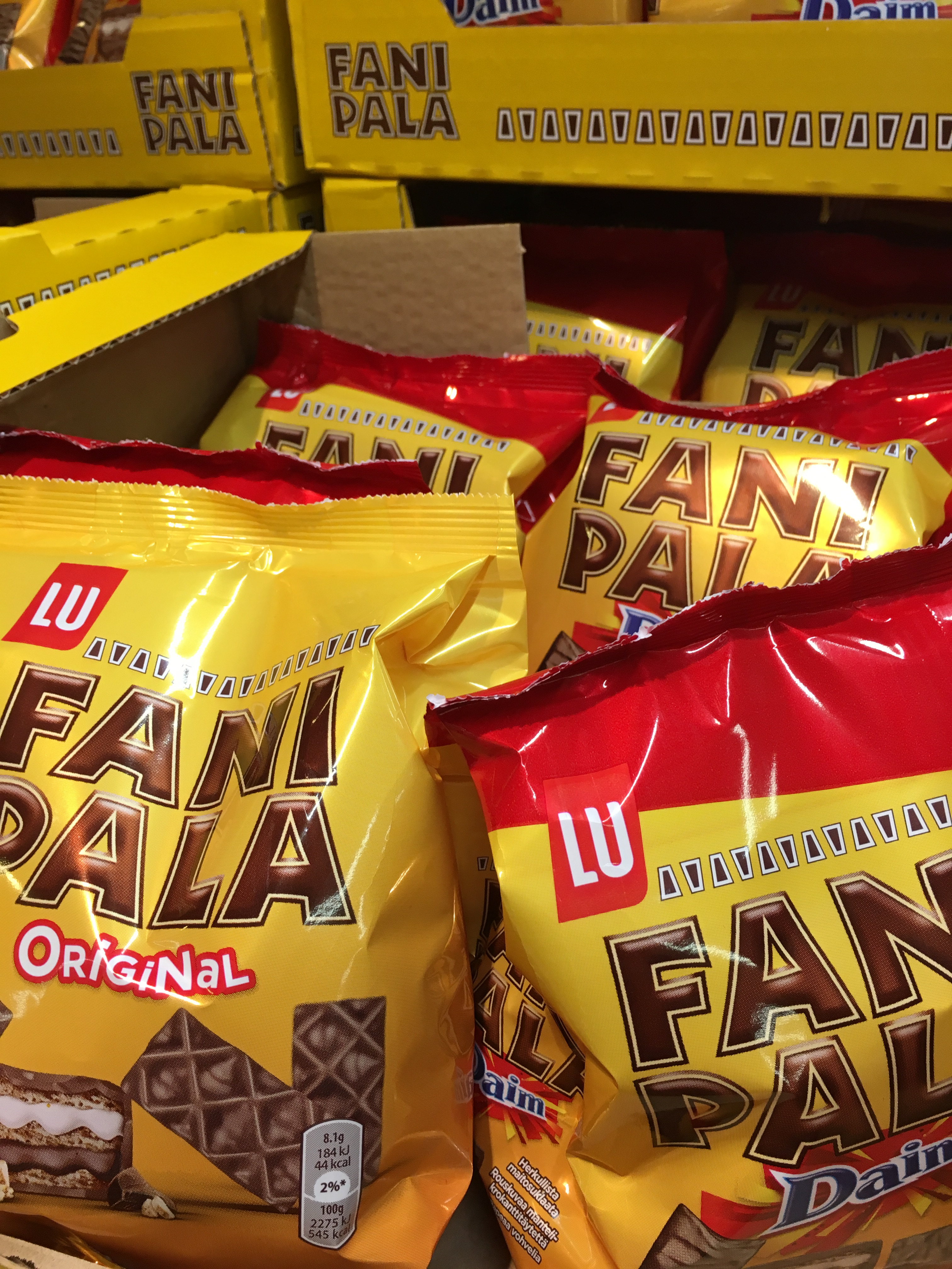 Fazerin Fanipaloja